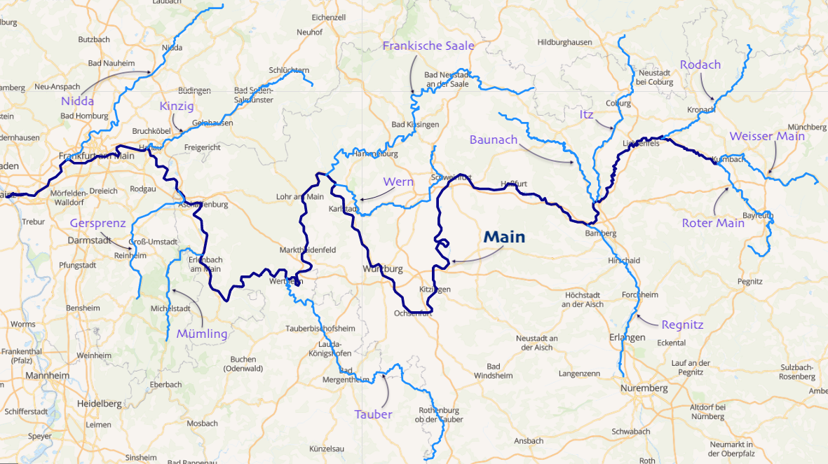 carte réalisée sur umap. This map may be incomplete, and may contain errors. Don't rely solely on it for navigation.